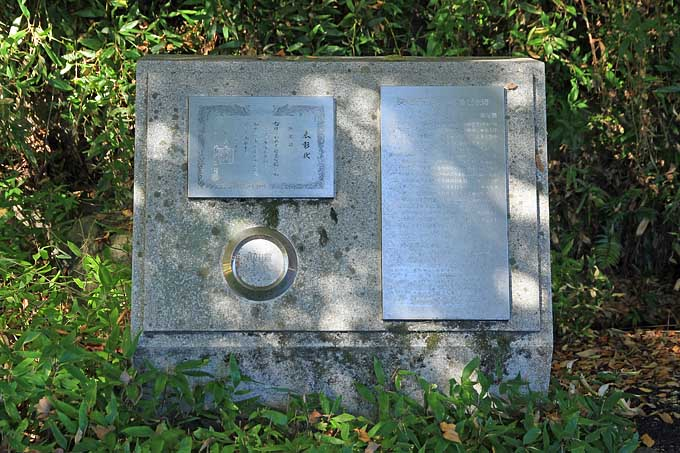 秩父橋の袂に所在する秩父橋「田中賞」受賞記念碑。埼玉県が設置。（埼玉県ja:秩父市）